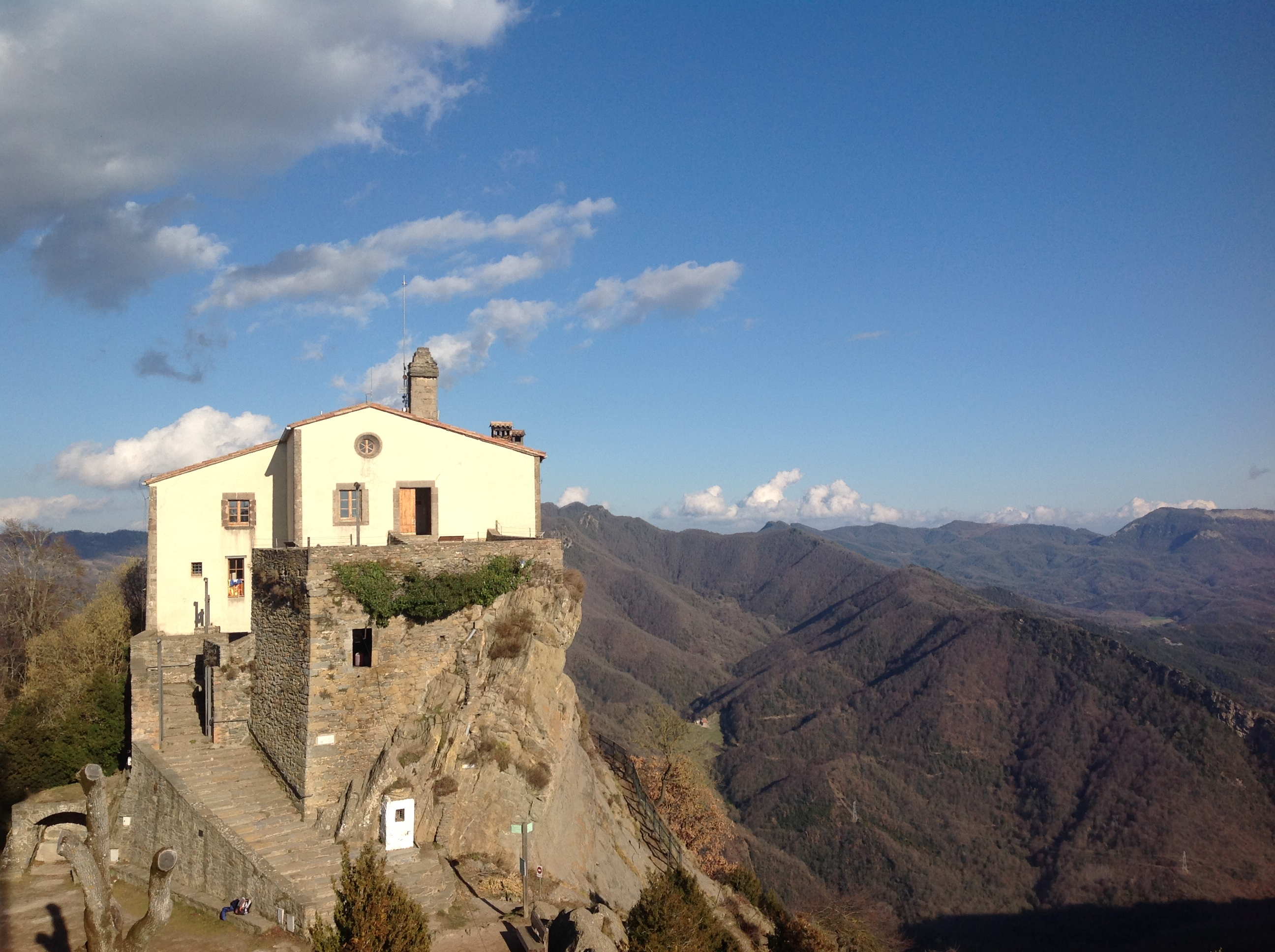 Santuari de la Mare de Déu de Bellmunt This is a a photo of a natural area in Catalonia, Spain, with id: ES510199